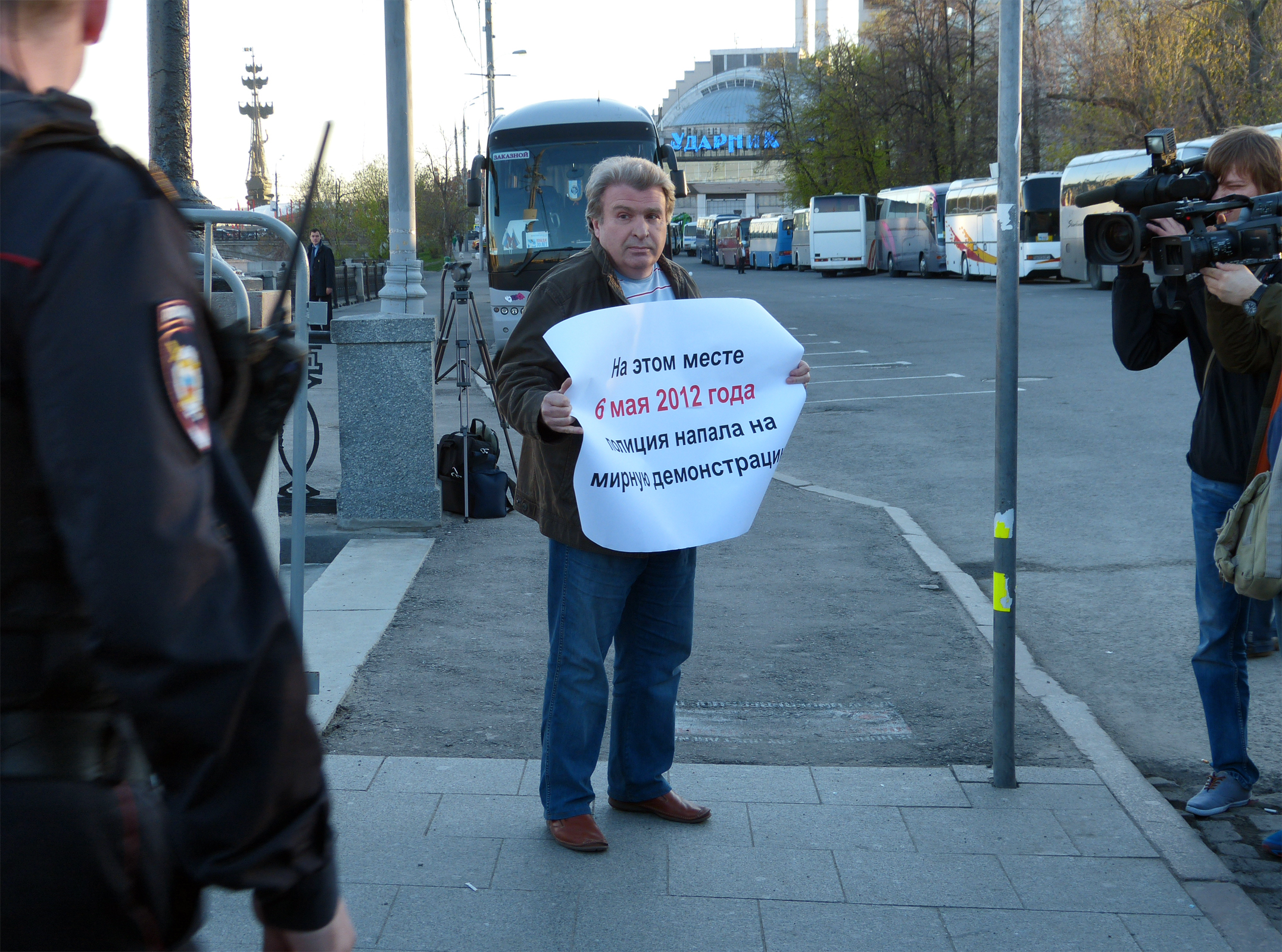 Лишь несколько секунд простоял в одиночном пикете Александр Рыклин, соратник Бориса Немцова, 6 мая 2015 года на Болотной набережной в Москве. Затем он был задержан полицией. Надпись на плакате: «На этом месте 6 мая 2012 года полиция напала на мирную демонстрацию».